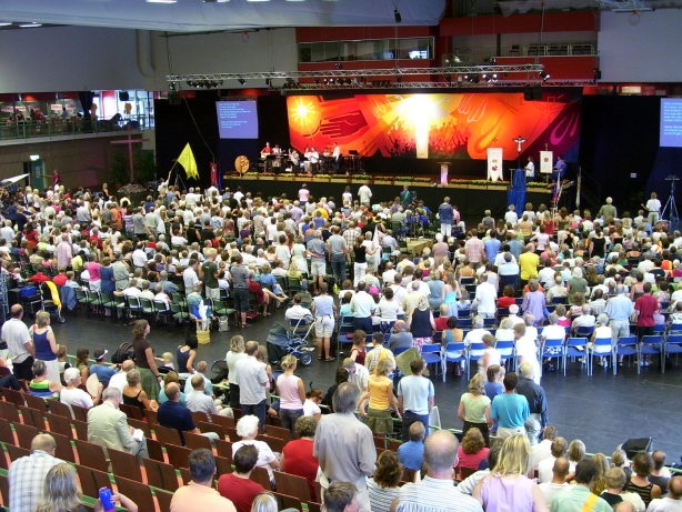 Oas movement summer meeting 2006 in Skövde (Oasrörelsens sommarmöte 2006 i Skövde)